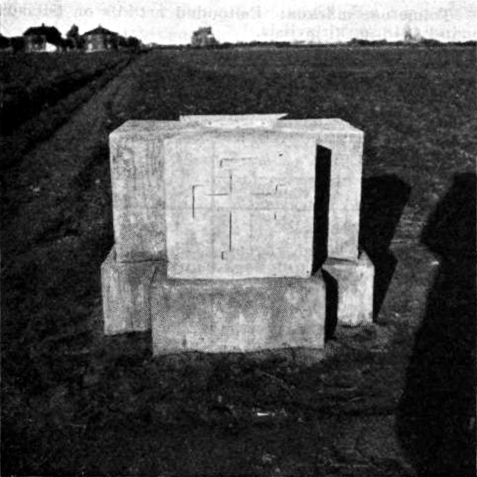 "Siin peeti Joala lahing 28. nov. 1918. a." Sammas lahinguvälja keskkohas.